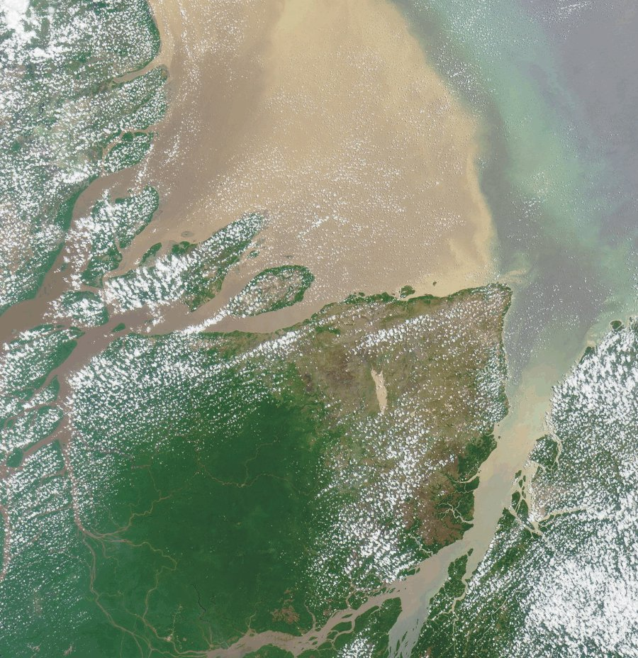 Amazonasmündung, Aufnahme des Terra-Satelliten (PIA02643), NASA/GSFC/JPL, MISR Team